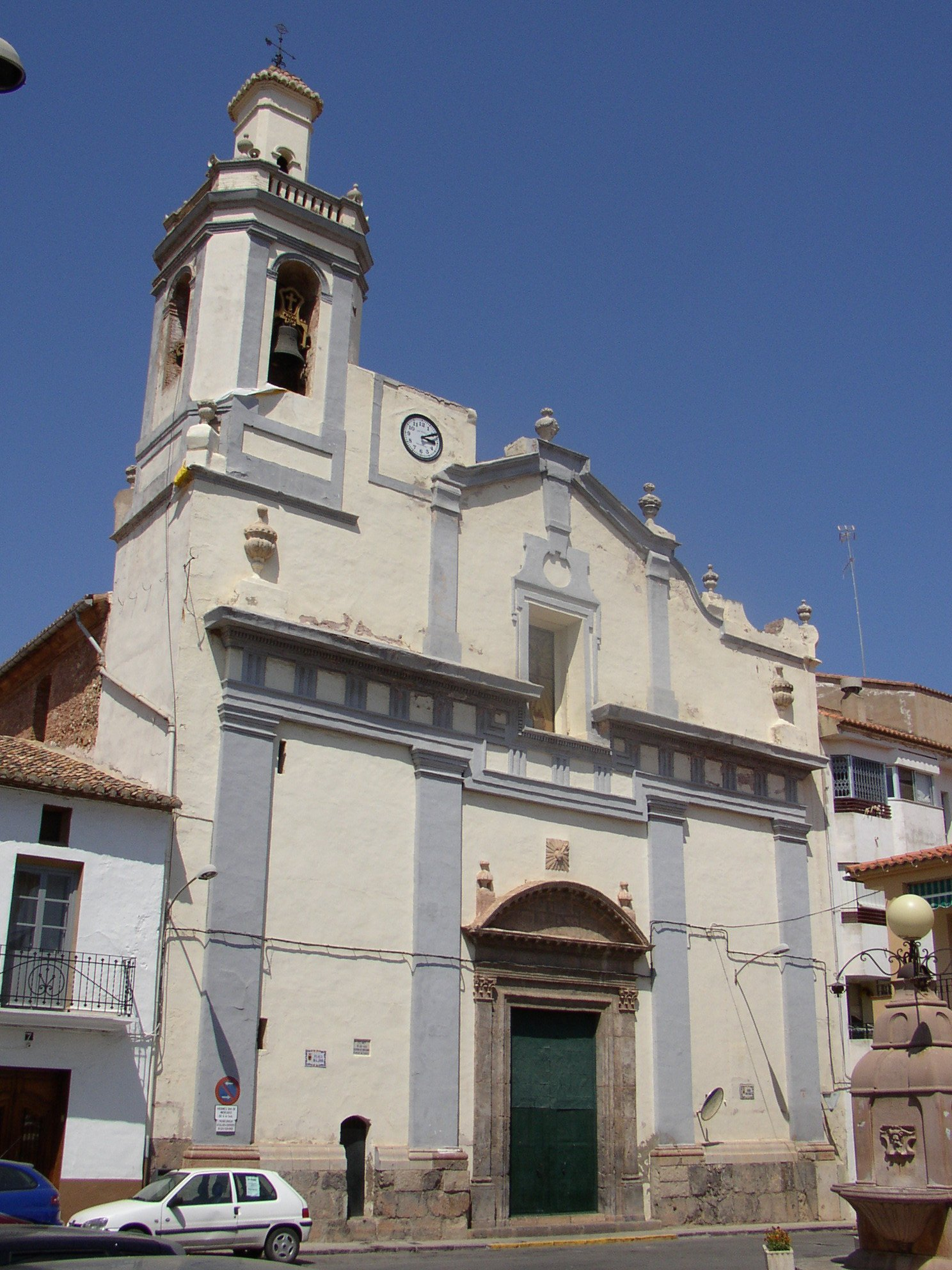 Església parroquial de Sant Miquel Arcàngel, a Quart de les Valls (Camp de Morvedre). Pl. Major, 8